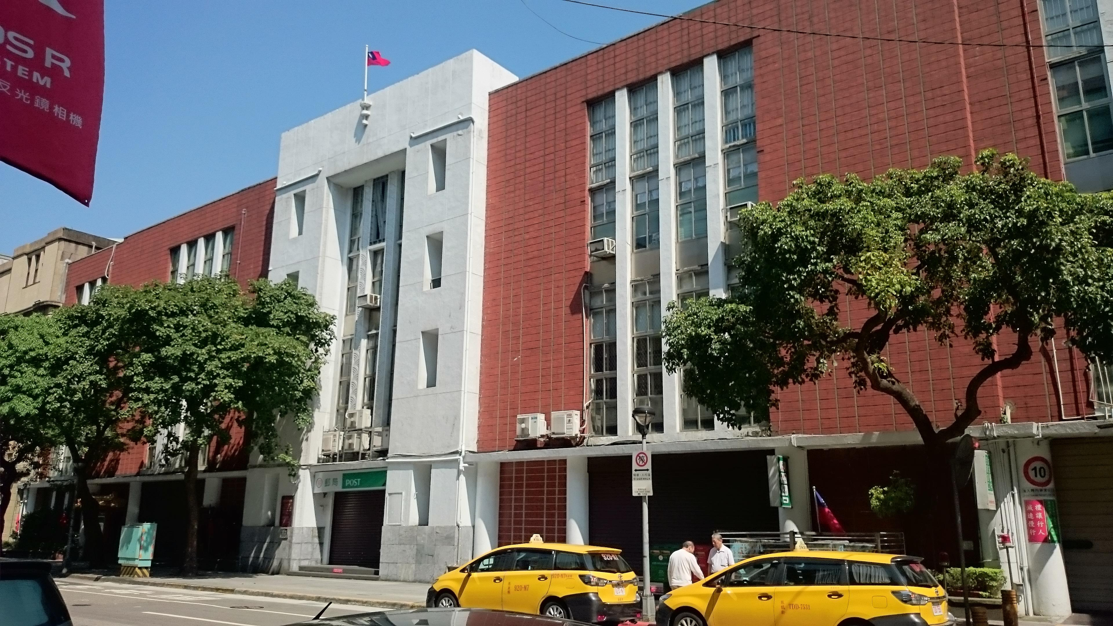 臺北郵局博愛路大樓正面，朝向臺北市中正區博愛路。